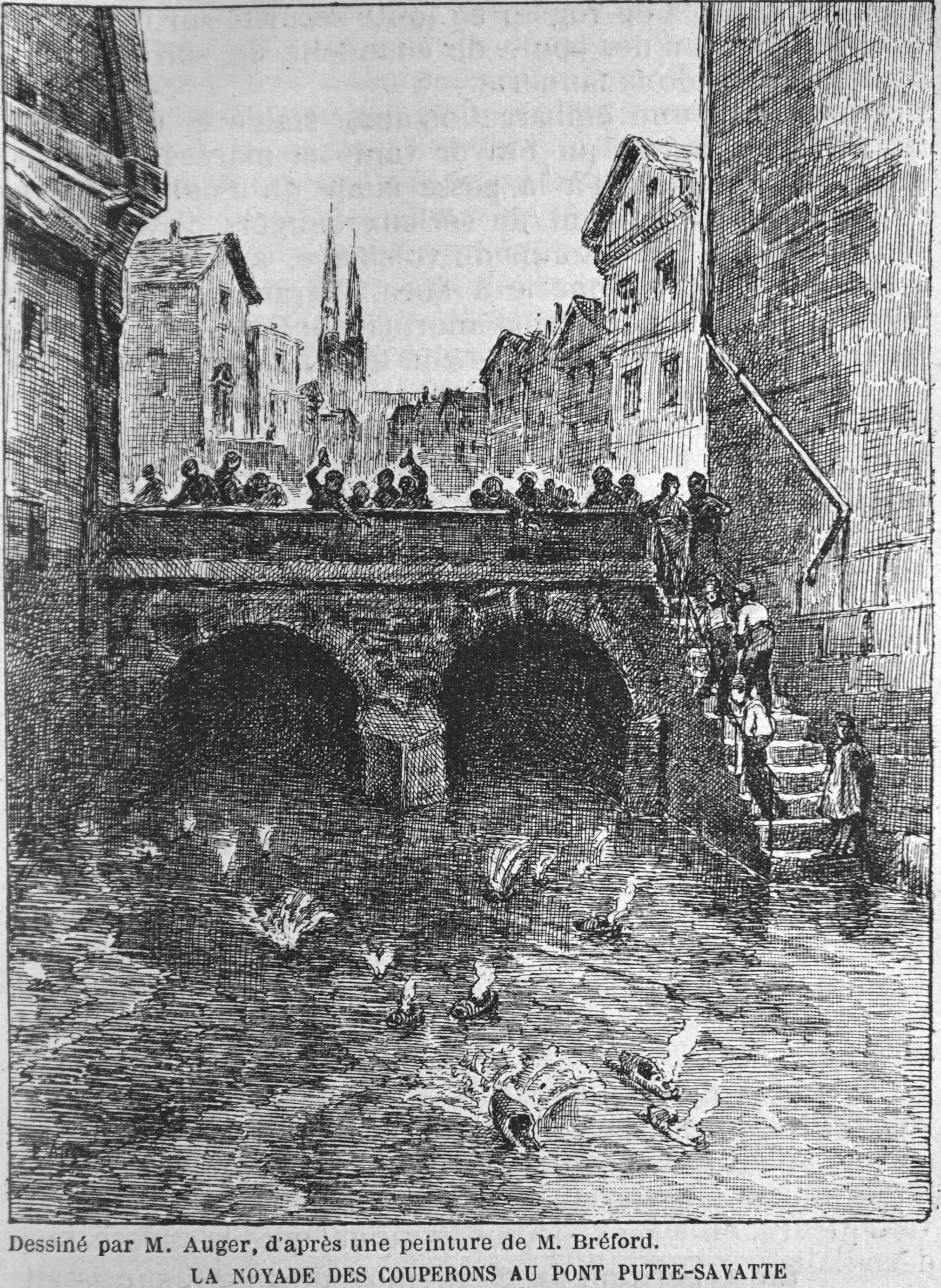 noyade des couperons au Pont Putte Savate de Châlons-sur-Marne, vue sur Matot-Brain de 1908.